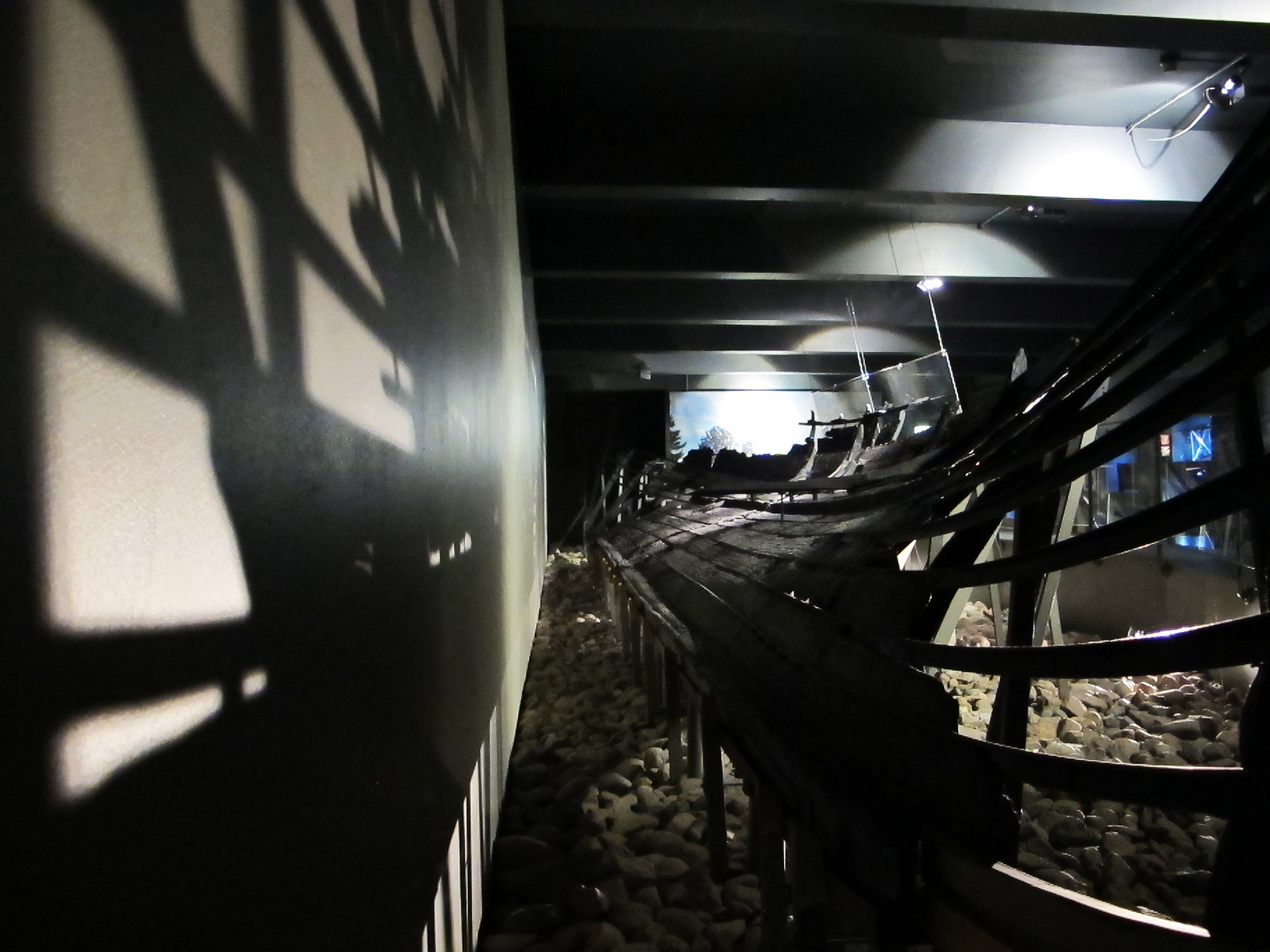 Originale bordganger og spanter fra funnet av Klåstadskipet er montert på et stålskjellett som viser skipets form.